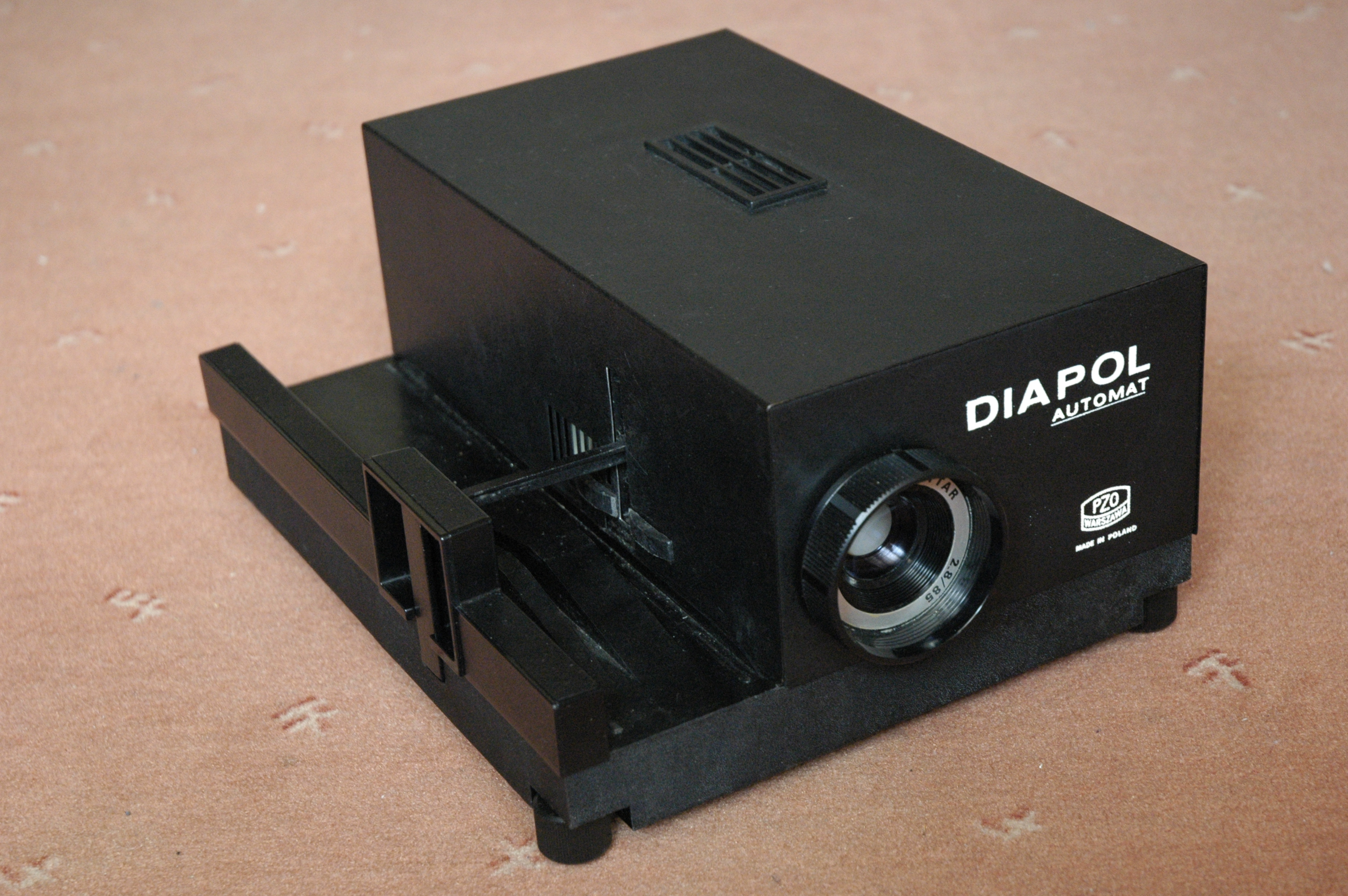 Rzutnik do slajdów firmy PZO "Diapol Automat". Fotografia - dzieło własne